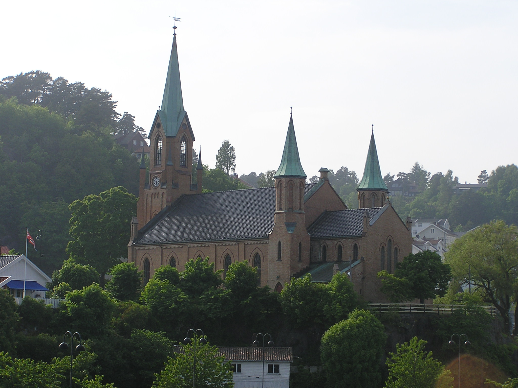 Kragerø kirke